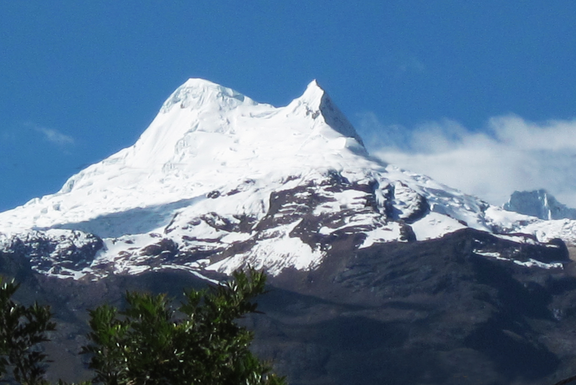 Vallunaraju desde Huaraz